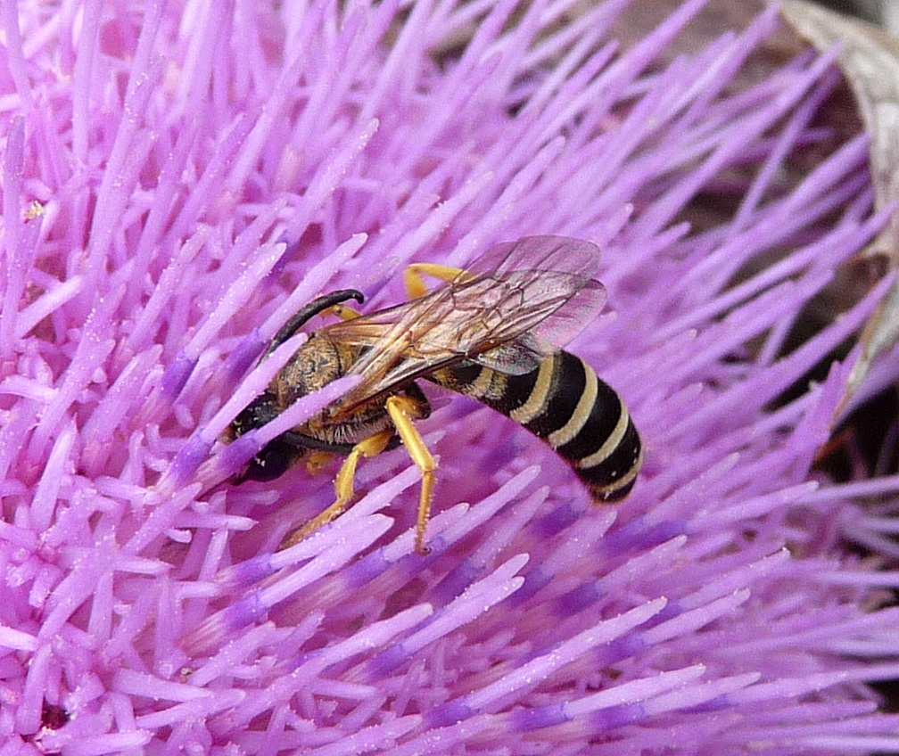 Halictus scabiosae. male.